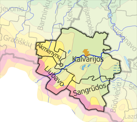 Kalvarijų savivaldybės seniūnijos (lt::image:LietuvosSeniunijos.png)